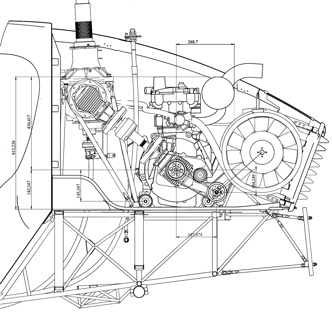 Трансмиссия вертолёта